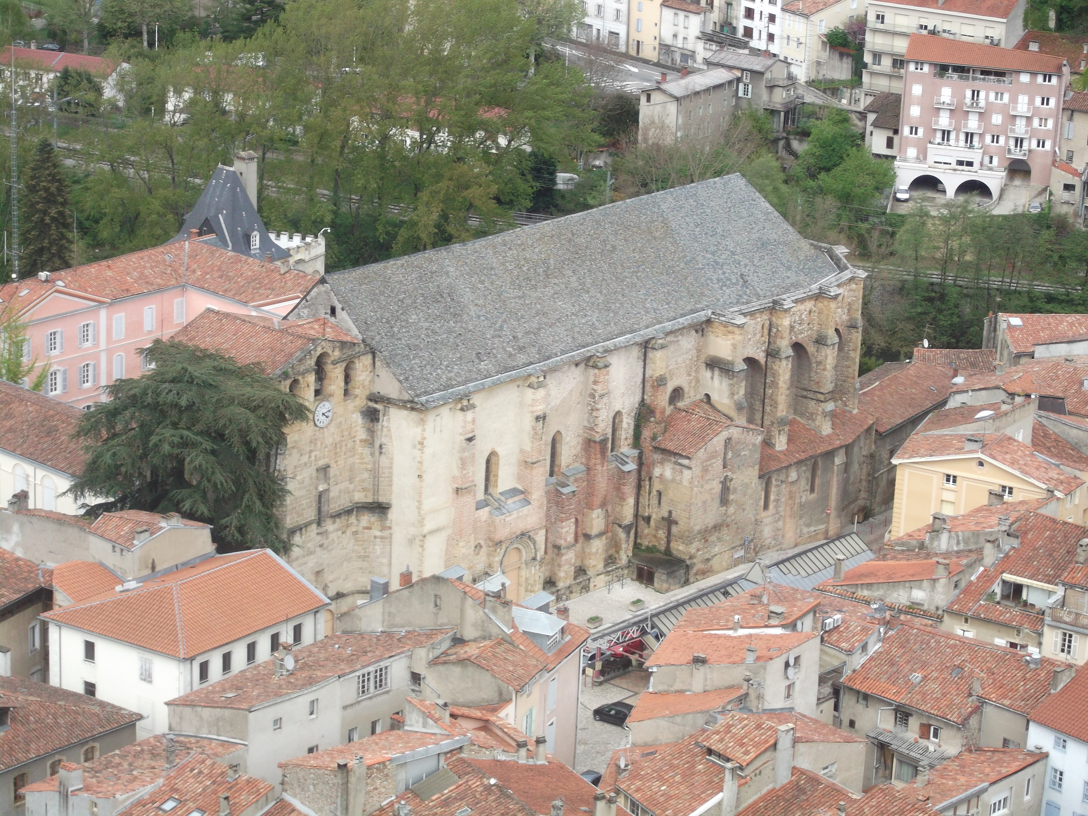 Église Saint-Volusien de Foix, dans l'Ariège (France) .